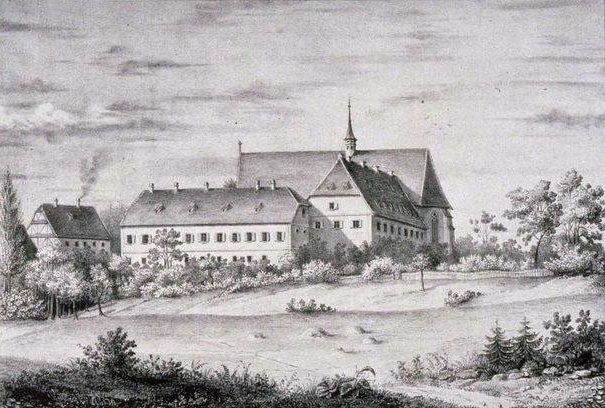 Ansicht des Klosters und der Kirche von Marienthal. Bibliothèque nationale et universitaire de Strasbourg